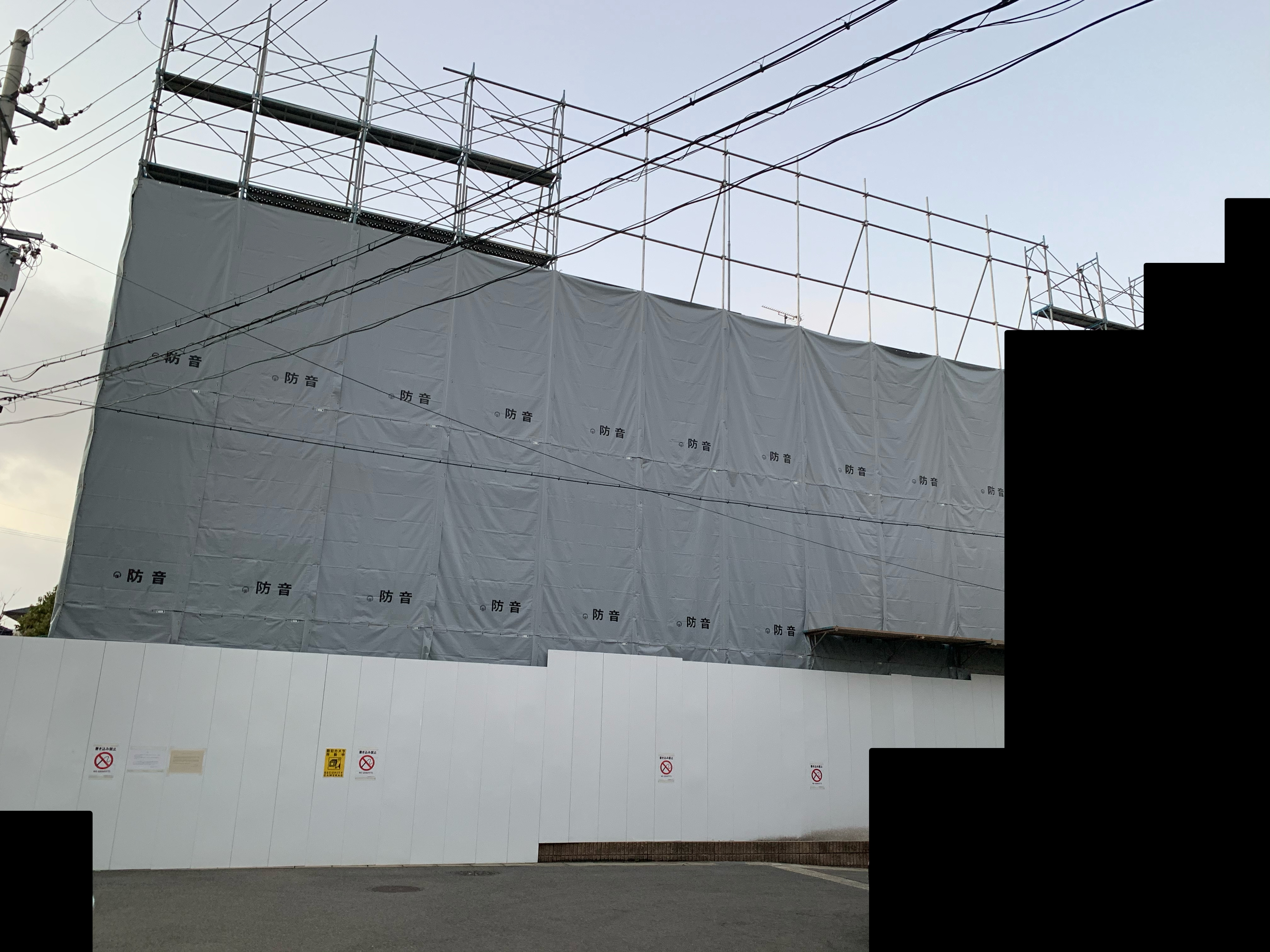 2019年12月31日に撮影された京都アニメーション第1スタジオ。解体工事準備中につき、防音シートで覆われている。なお、プライバシーの観点から写真の一部に加工を施した。